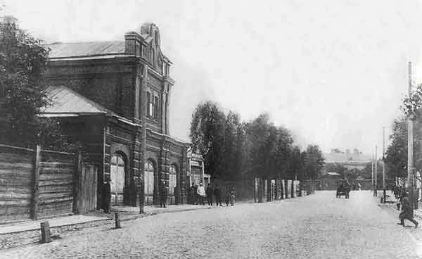 Пажарнае дэпо, здымак канца ХIX ст.